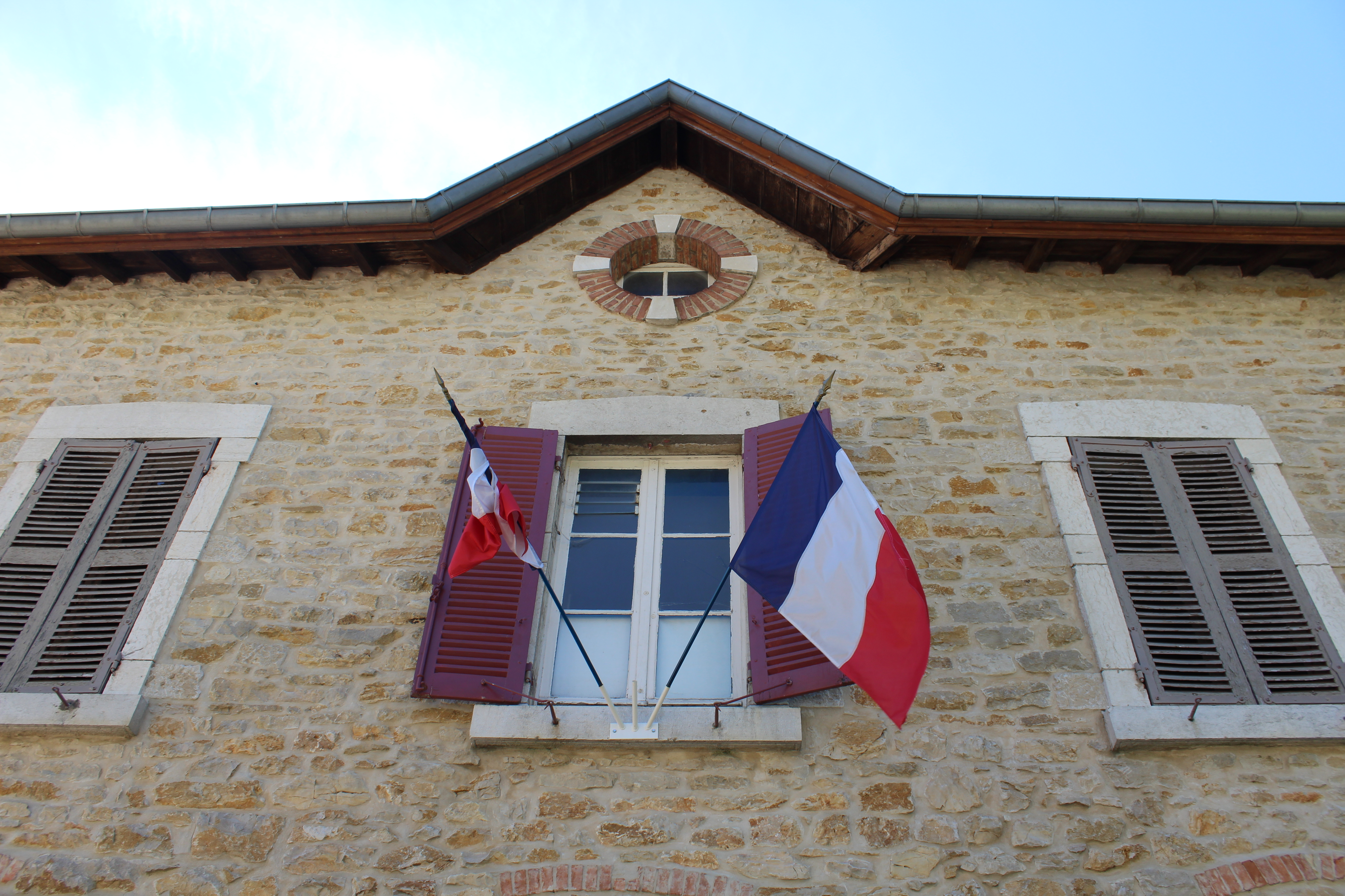 Mairie de Cuisiat, Val-Revermont.